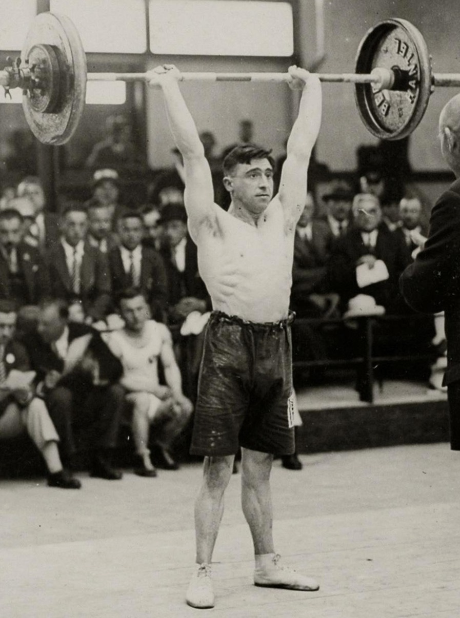 Sport. Sport, Olympische Spelen 1928, Amsterdam : De Engelse gewichtheffer Baxter in actie tijdens de discpline vedergewicht tot 60 kg.